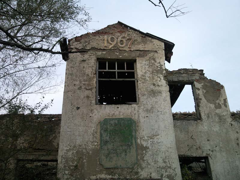 Остатки тюрьмы Новосадовый